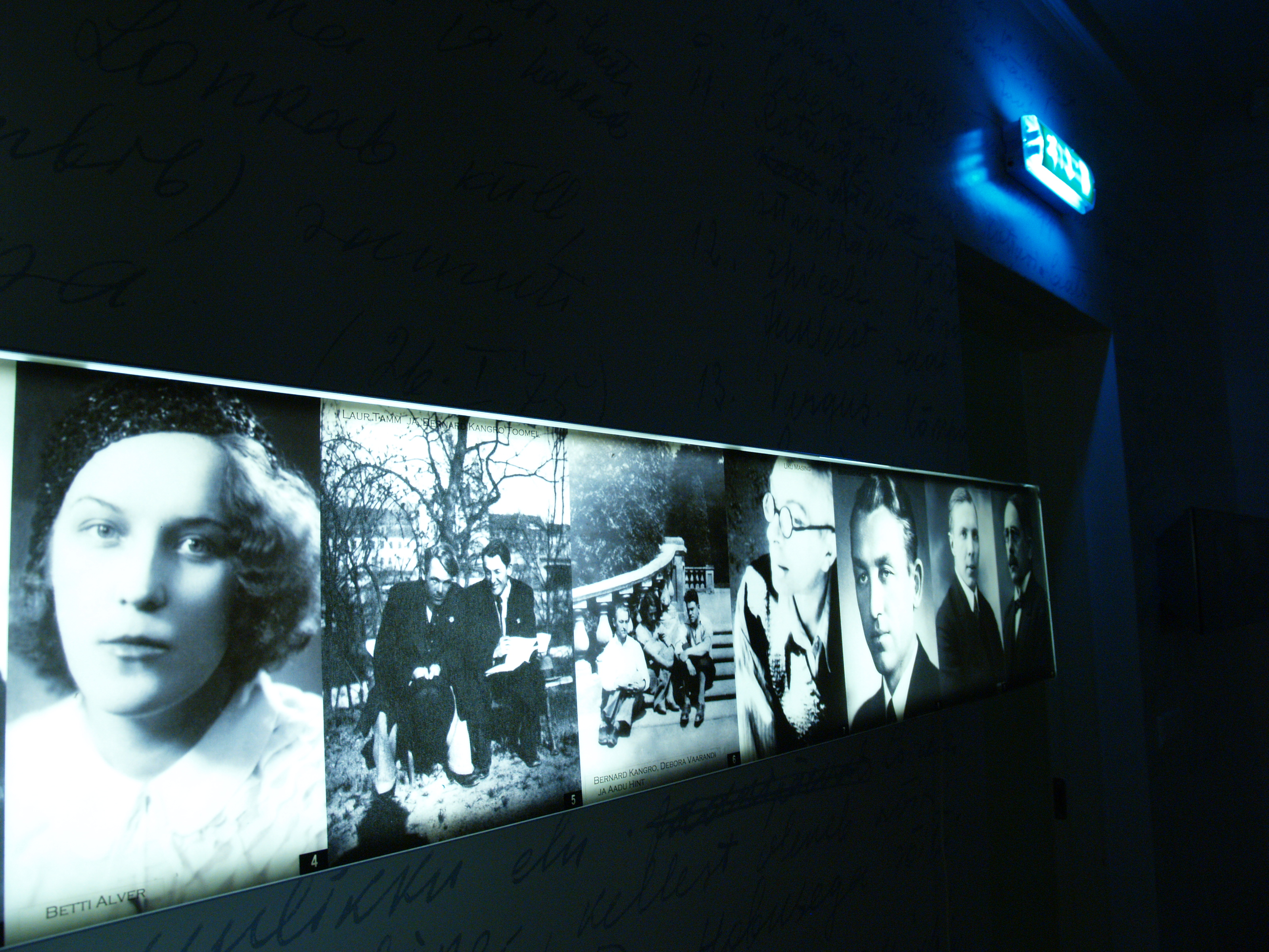 Betti Alveri muuseum.